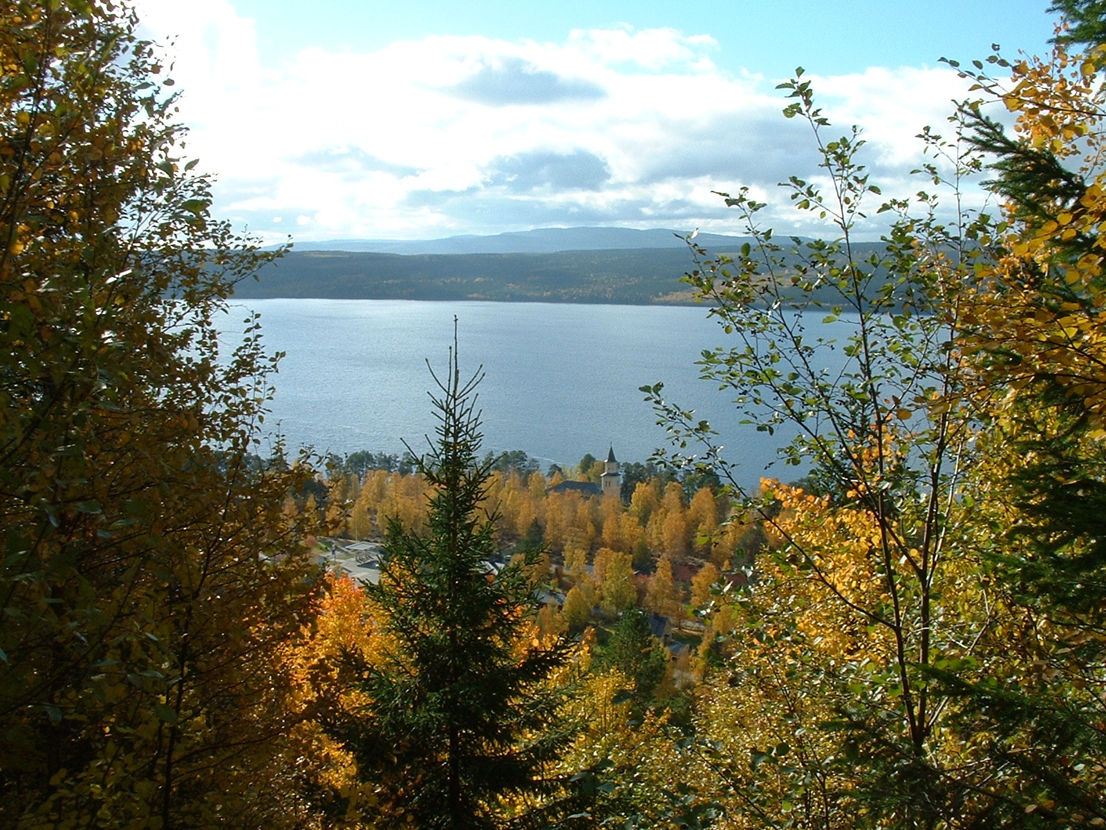 Tåsjön and Kyrktåsjö seen from the old road on Tåsjöberget.